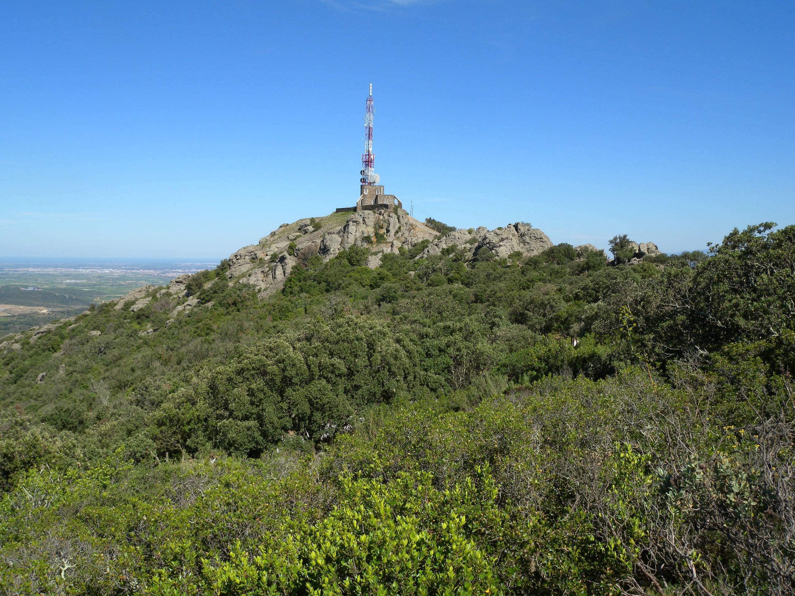 Le relais de Força Réal (Pyrénées-Orientales (66), France)